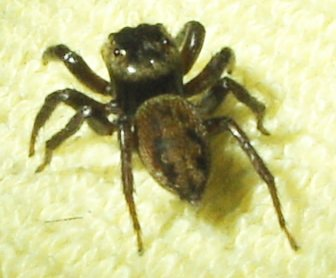 Female adult Hasarius adansoni, caught in Cologne Zoo Aquarium.